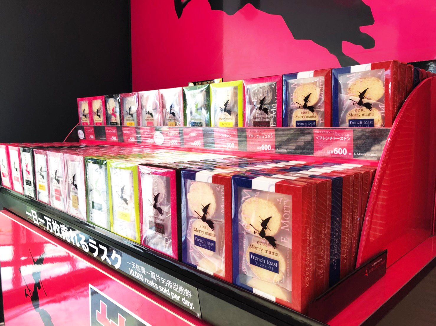 kobemorrymama